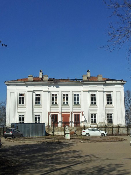 Фасад со стороны Большой Филёвской улицы